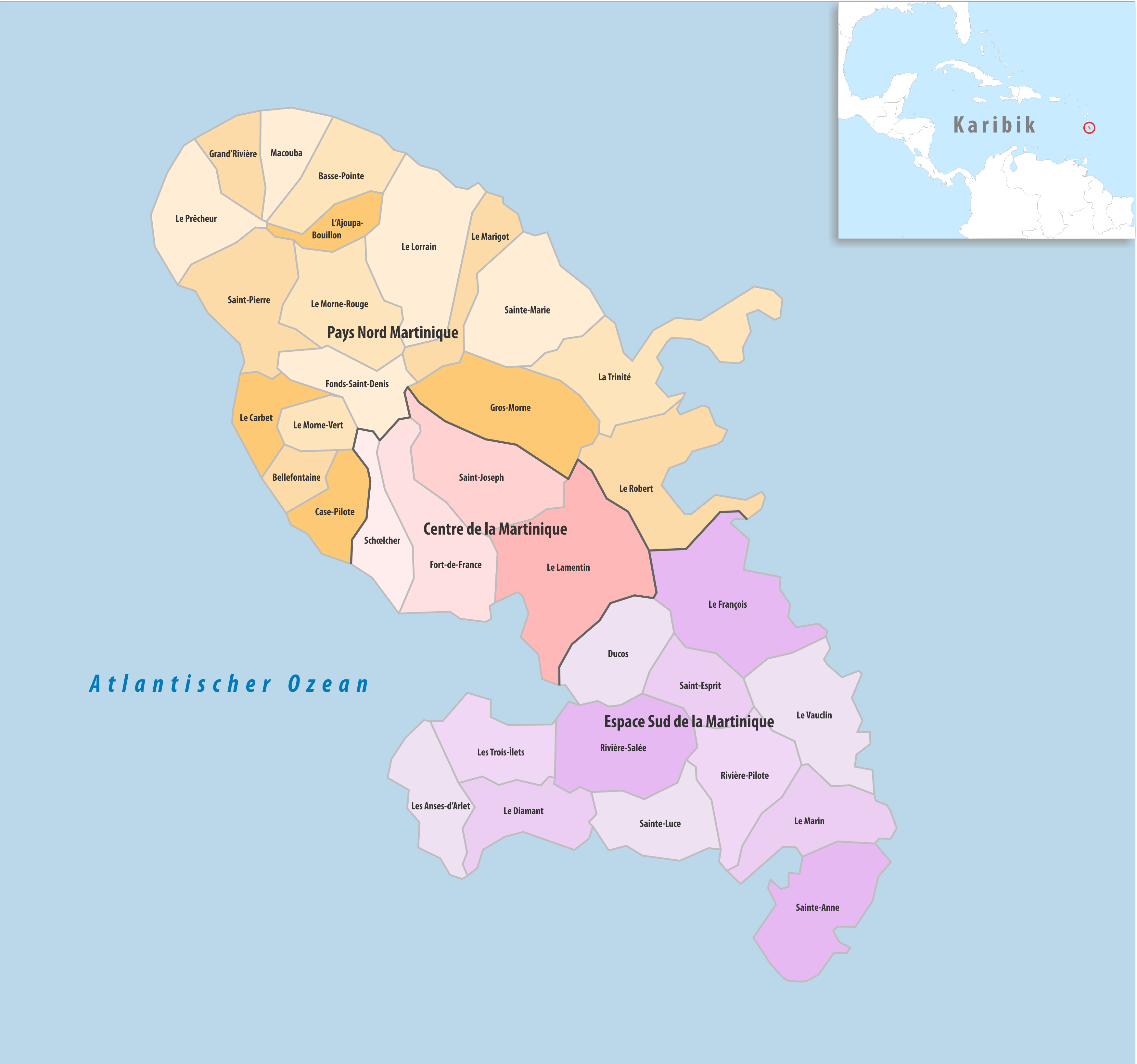 Gemeinden und Gemeindeverbände in Martinique